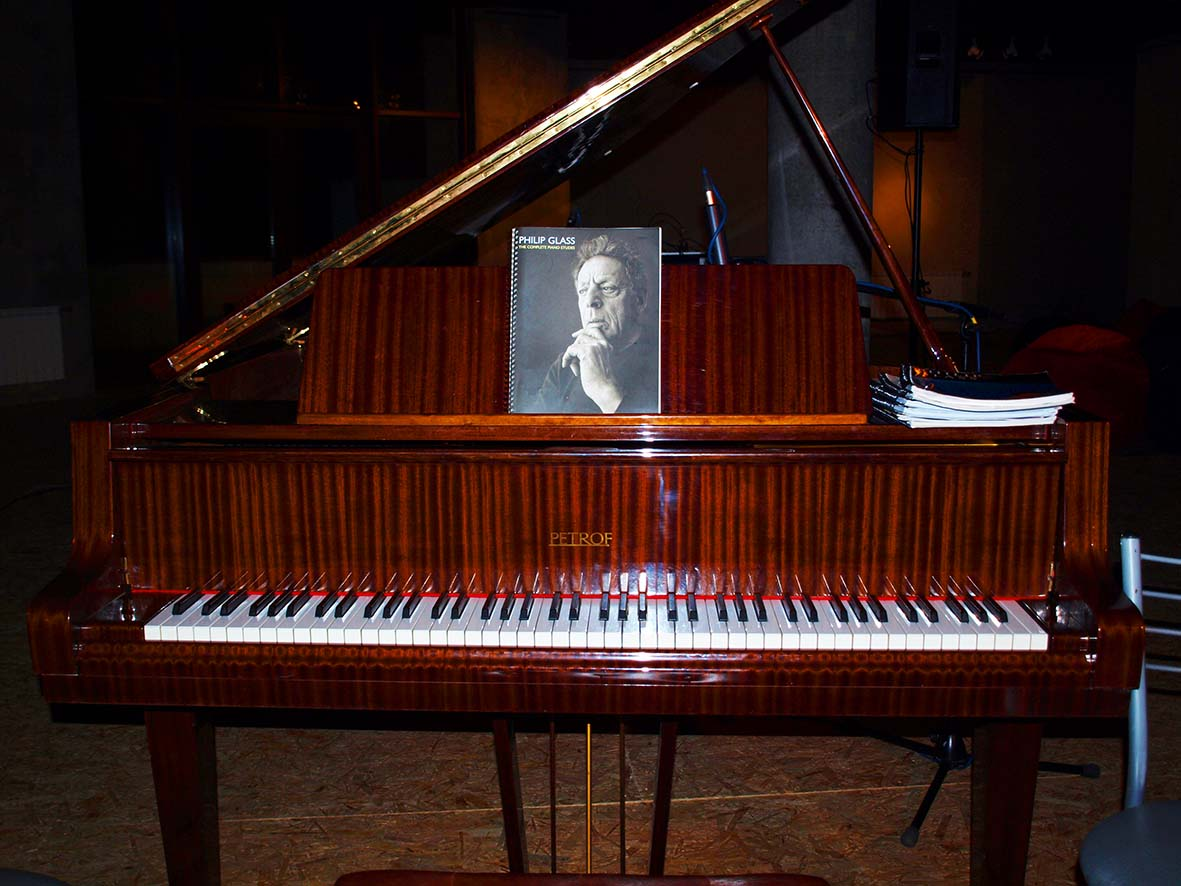 Philip Glass. Концерт Ніколя Горвата. 31.12-1.01.2015. Музей "Духовні скарби України” в Києві